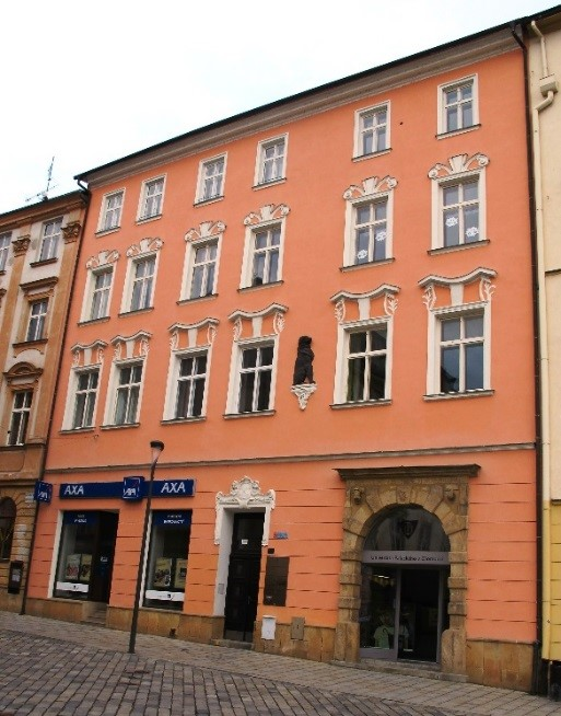 dům U Černého psa v Olomouci na Horním náměstí